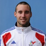 date de naissance; 1er février 1984